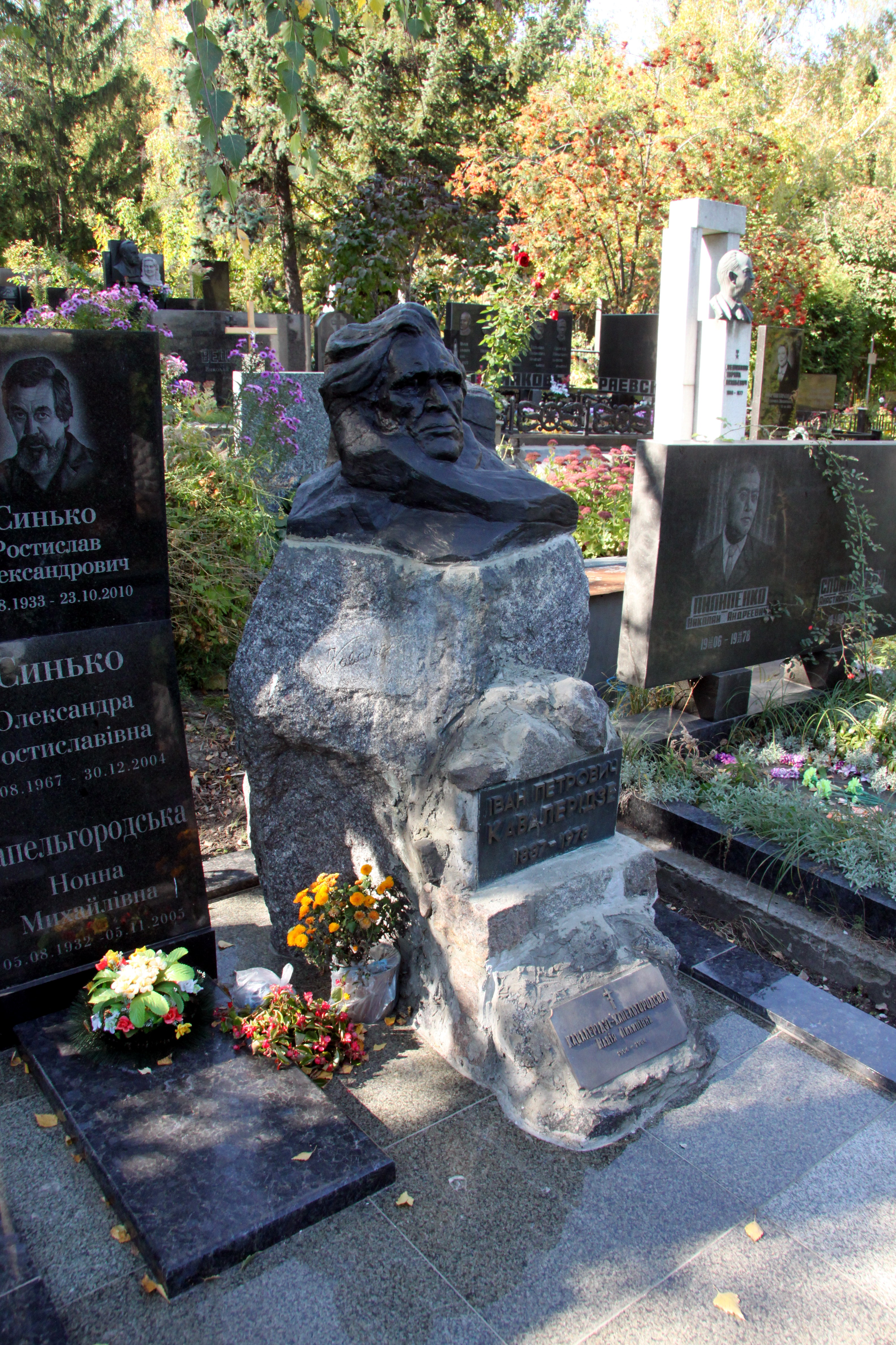 Могила Кавалерідзе І. П., скульптора, Байкова вул., 6, Київ